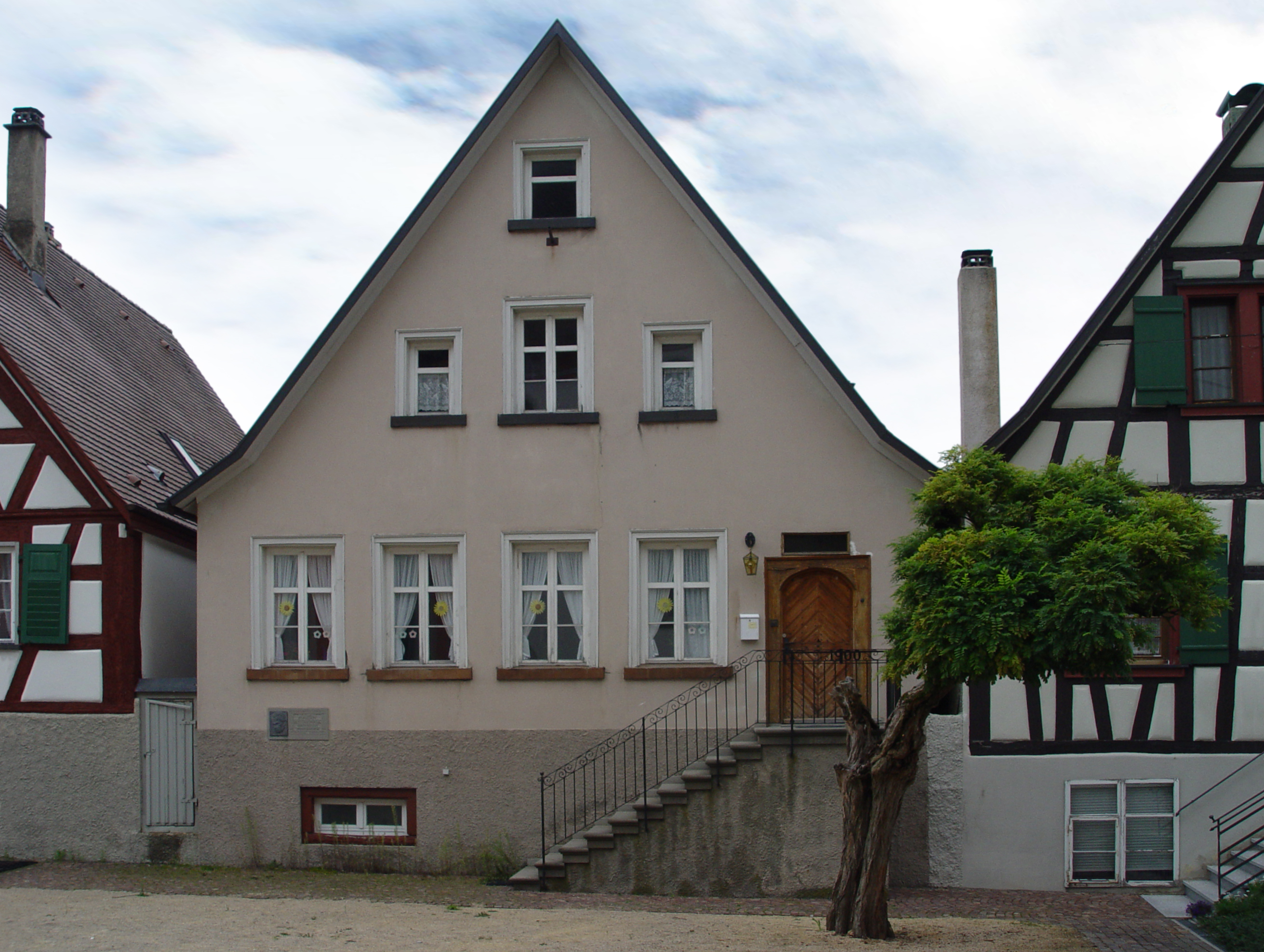 Geburtshaus von Martin Heidegger in Meßkirch, Baden-Württemberg (where Heidegger grew up) - la maison natale d'Heidegger - (ハイデッガーの出生地)